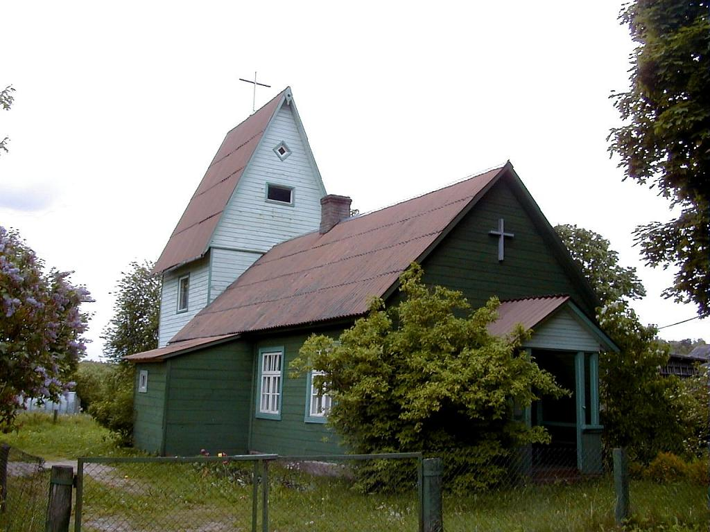 Pļavu baptistu baznīca 2001-06-09